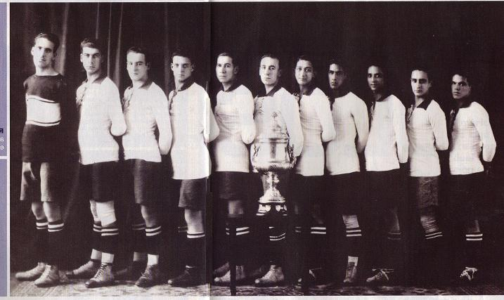 América Campeon Temporada 1922-1923